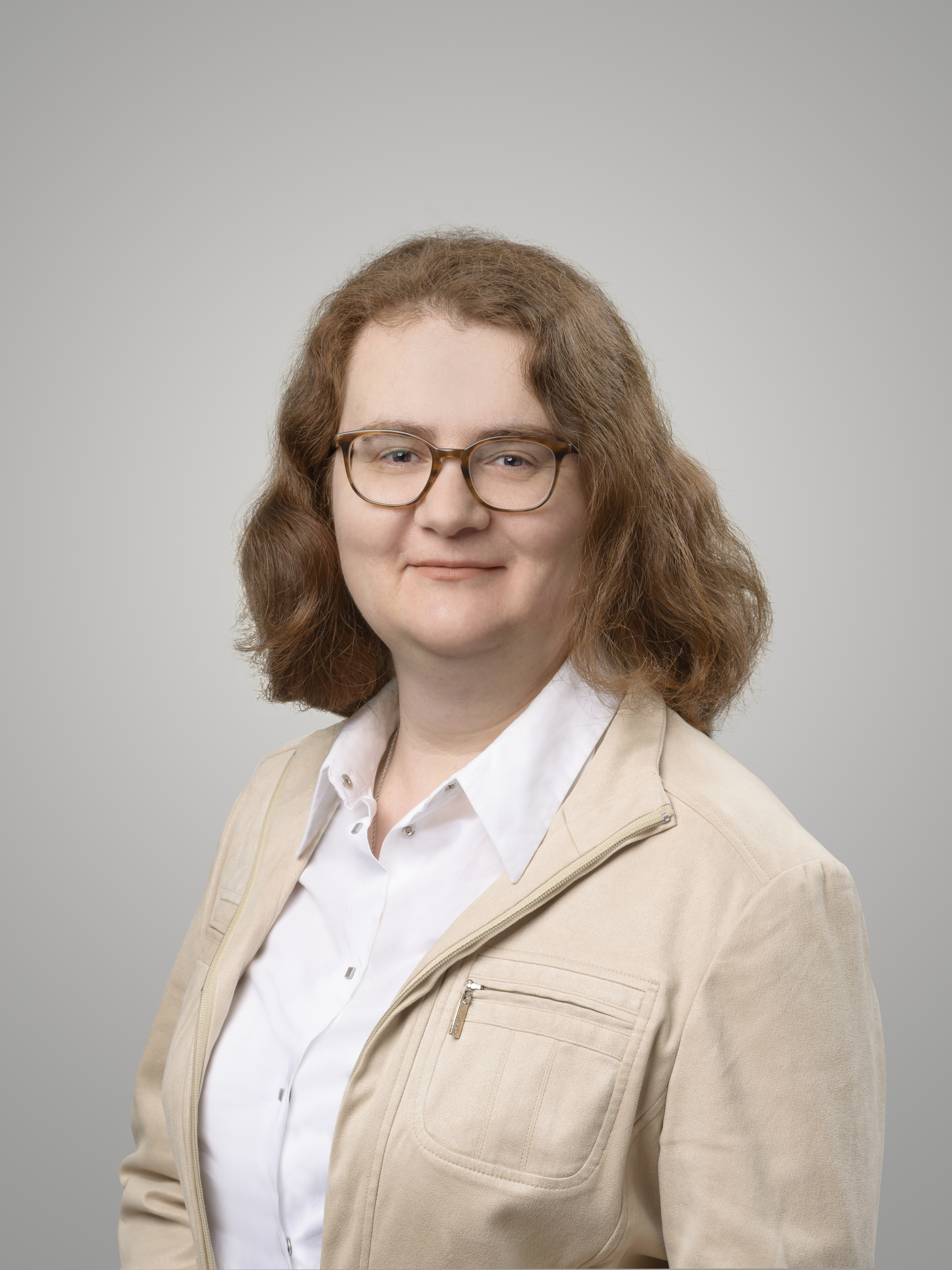 На фото Ірина Гуревич. Народилася у Вінниці, професор Дармштадтського технічного університету, доктор наук.